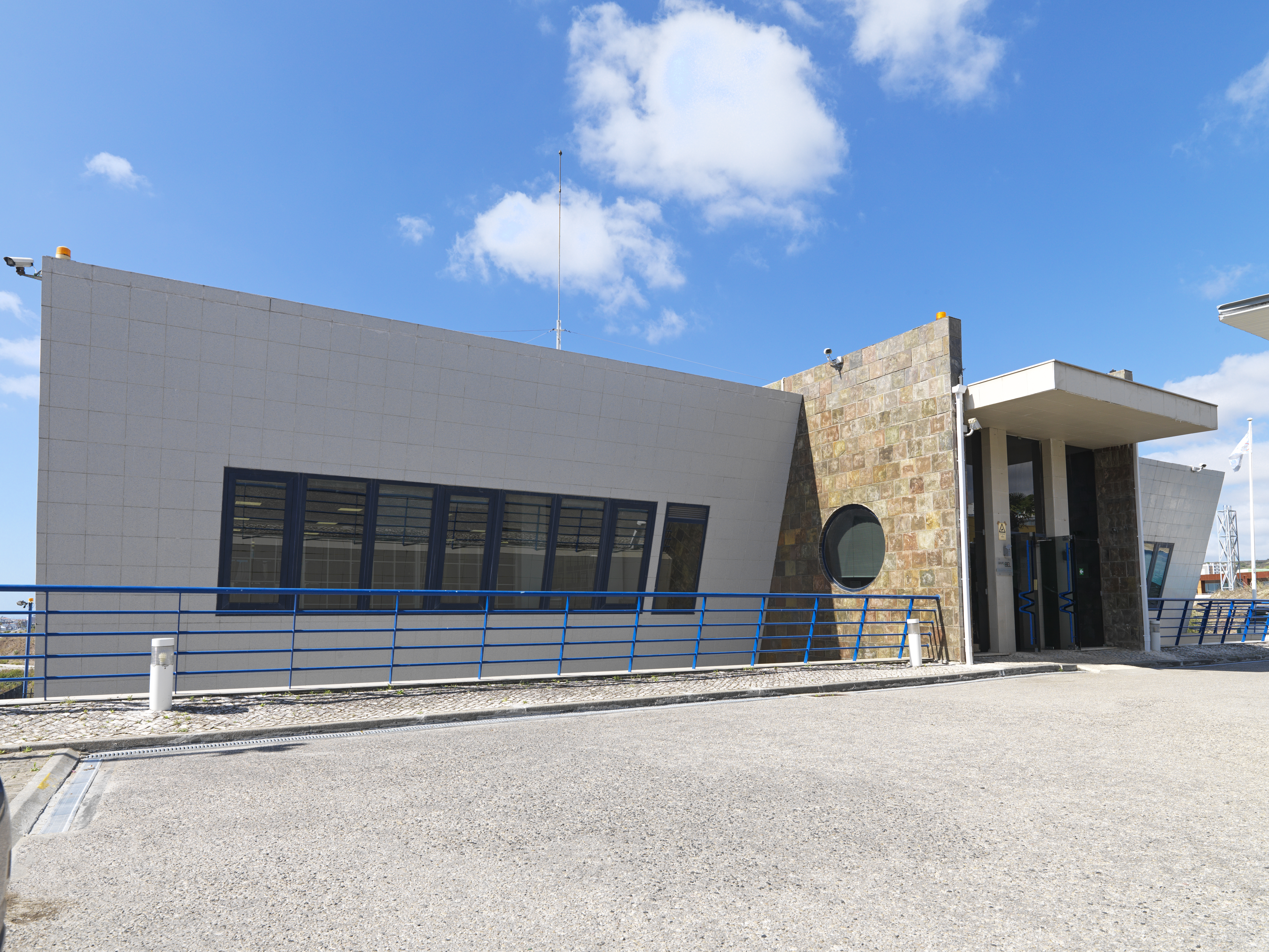 Sede do Grupo BEL